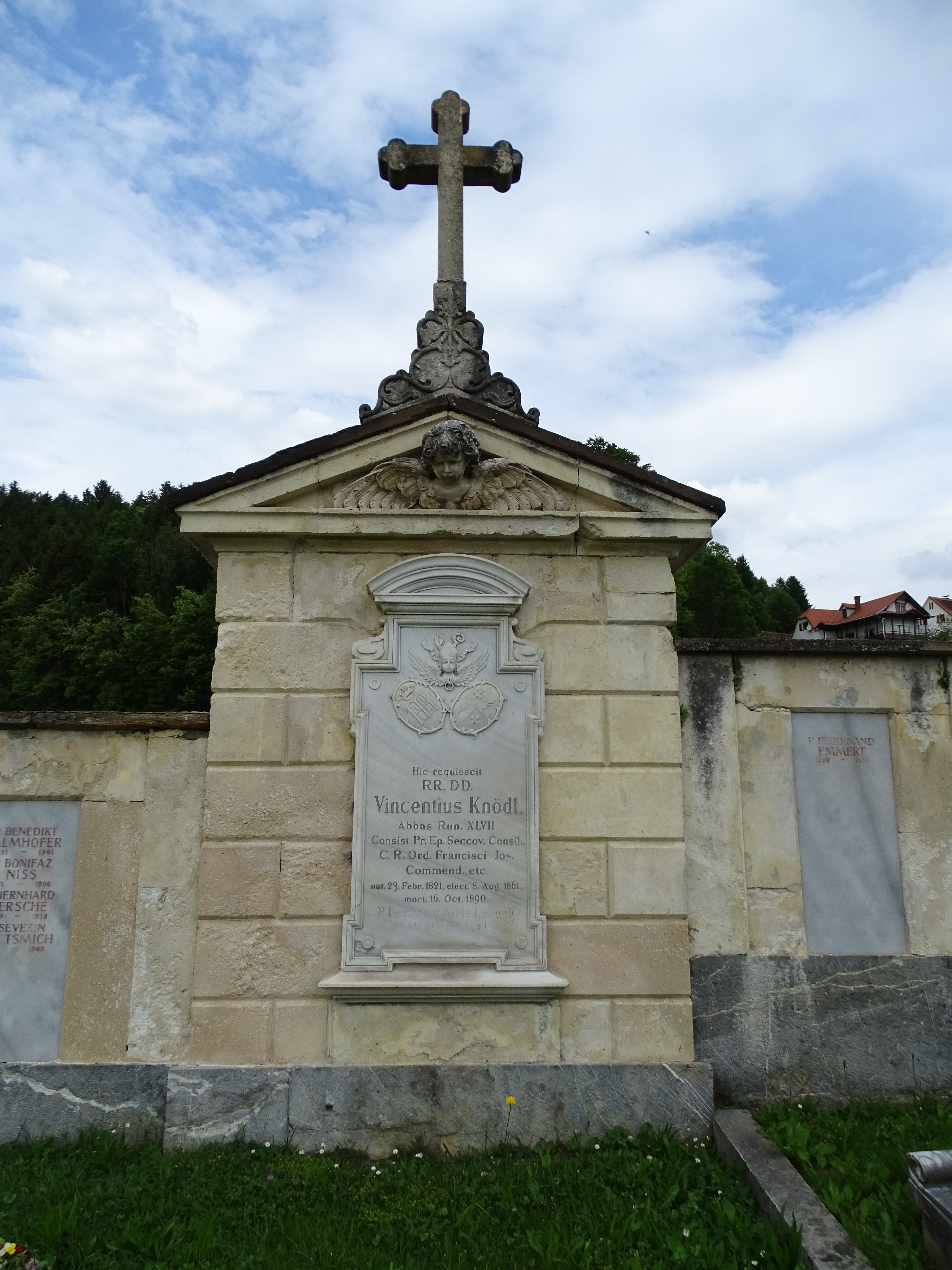 Die Abt- und Patresgräber am Friedhof Stift Rein-Eisbach